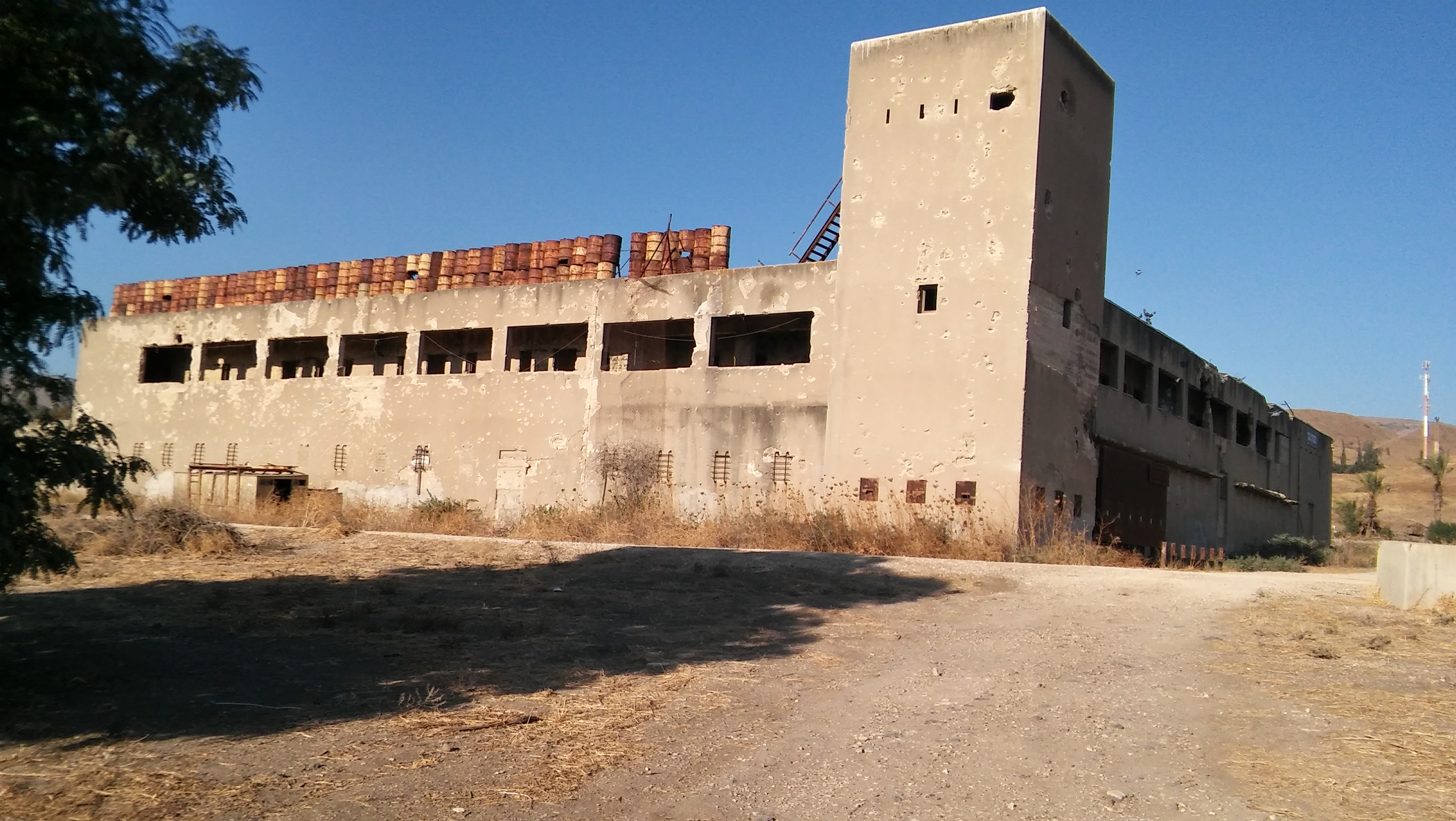 משטרת גשר